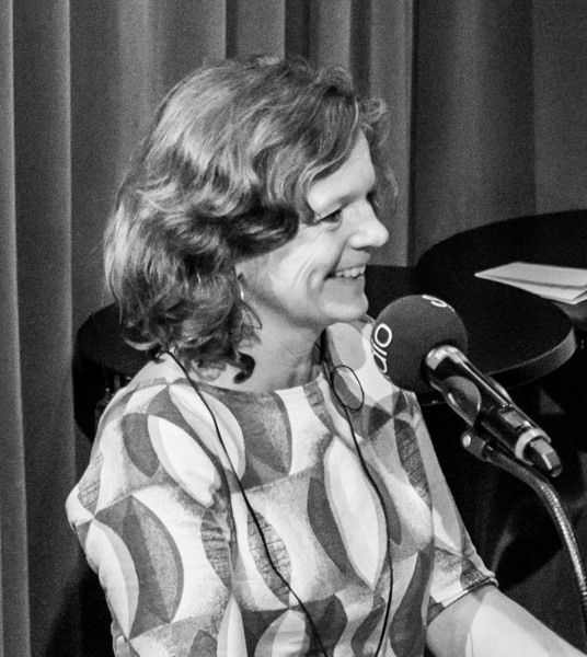 Lena Nordlundunder SR P1:s specialprogram "Nobel 2015: Inspiration och korsbefruktning", inspelat på Kulturhuset i Stockholm den 10 december 2015.